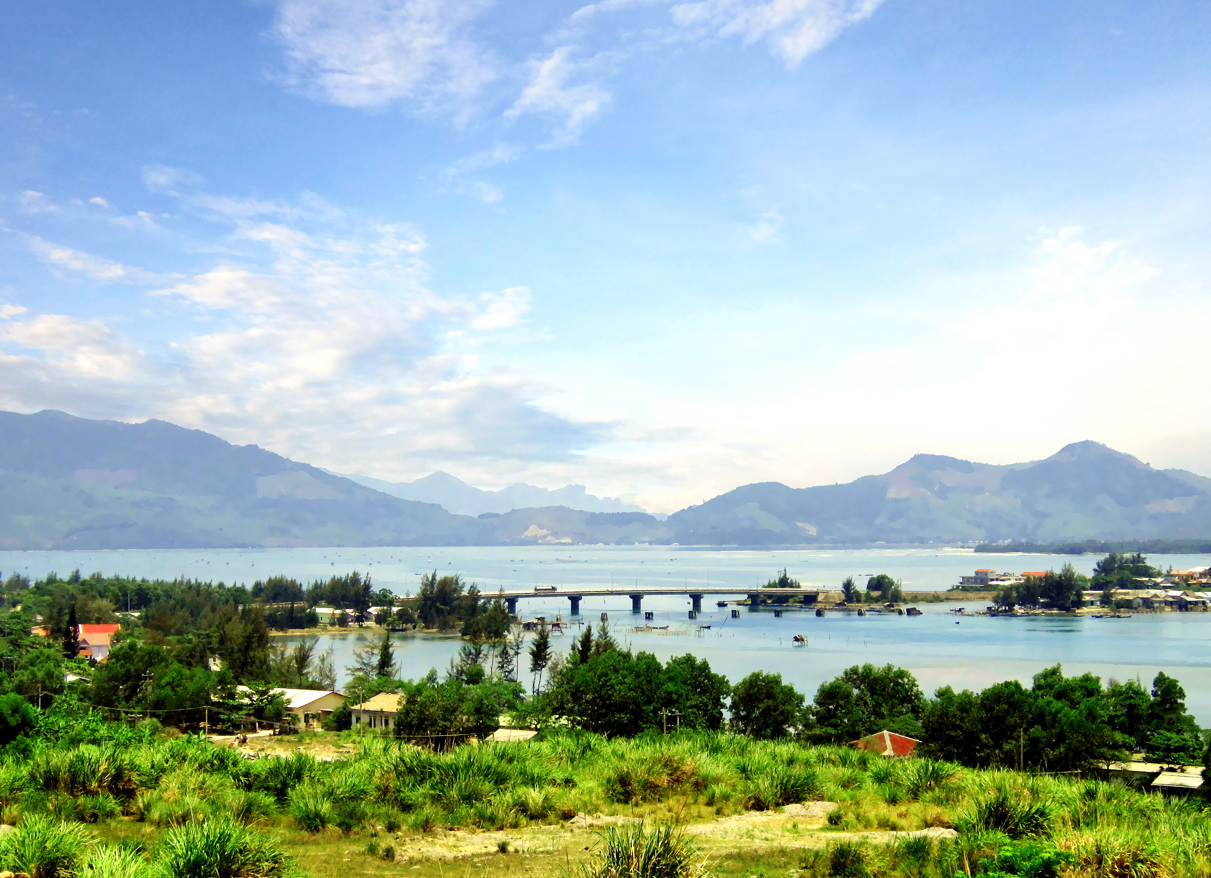 Một cảnh ở Lăng Cô, thuộc tỉnh Thừa Thiên-Huế, Việt Nam.